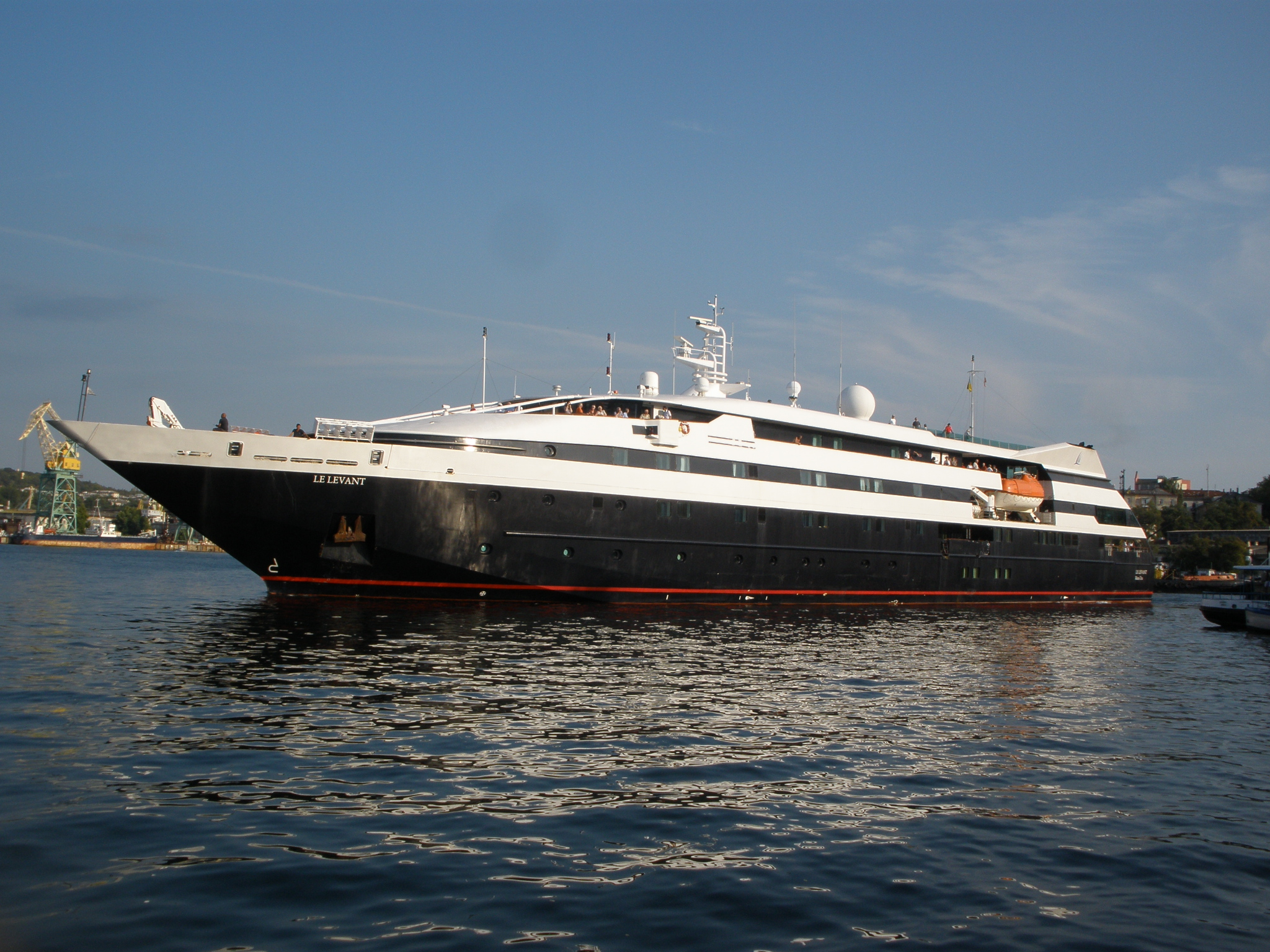 вид збоку